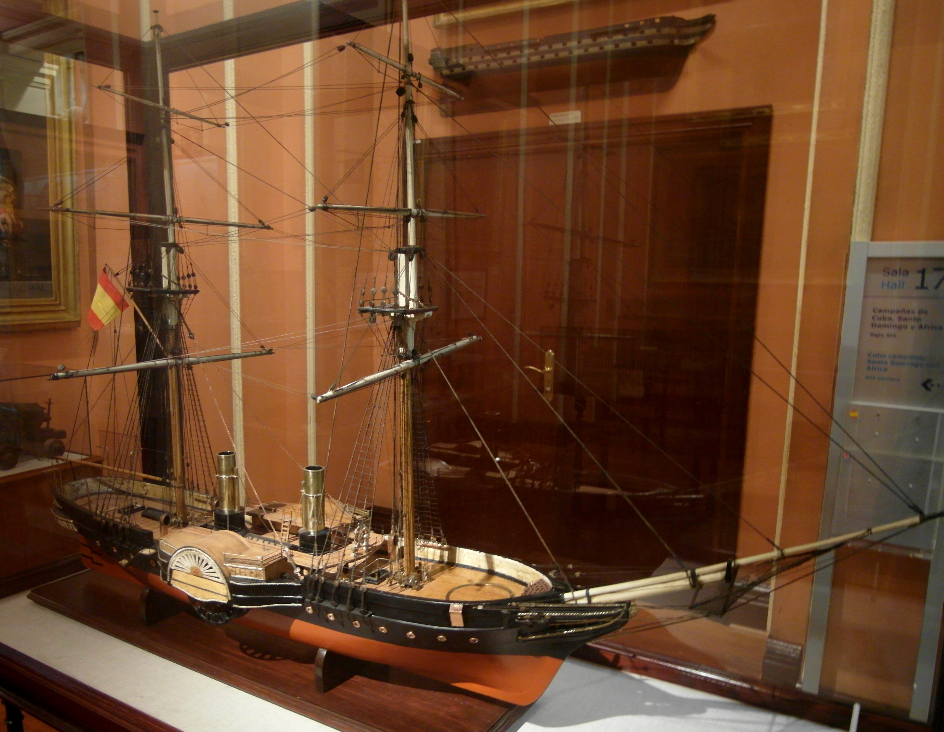 El vapor Blasco de Garay. Construido en Londres en 1845 y dado de baja en 1884.